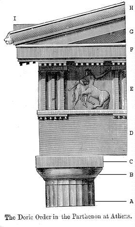 Hoofdgestel Gebaseerd op commons file [File:DoricParthenon.jpg]. Zelf letters verwijderd en andere volgorde toegevoegd